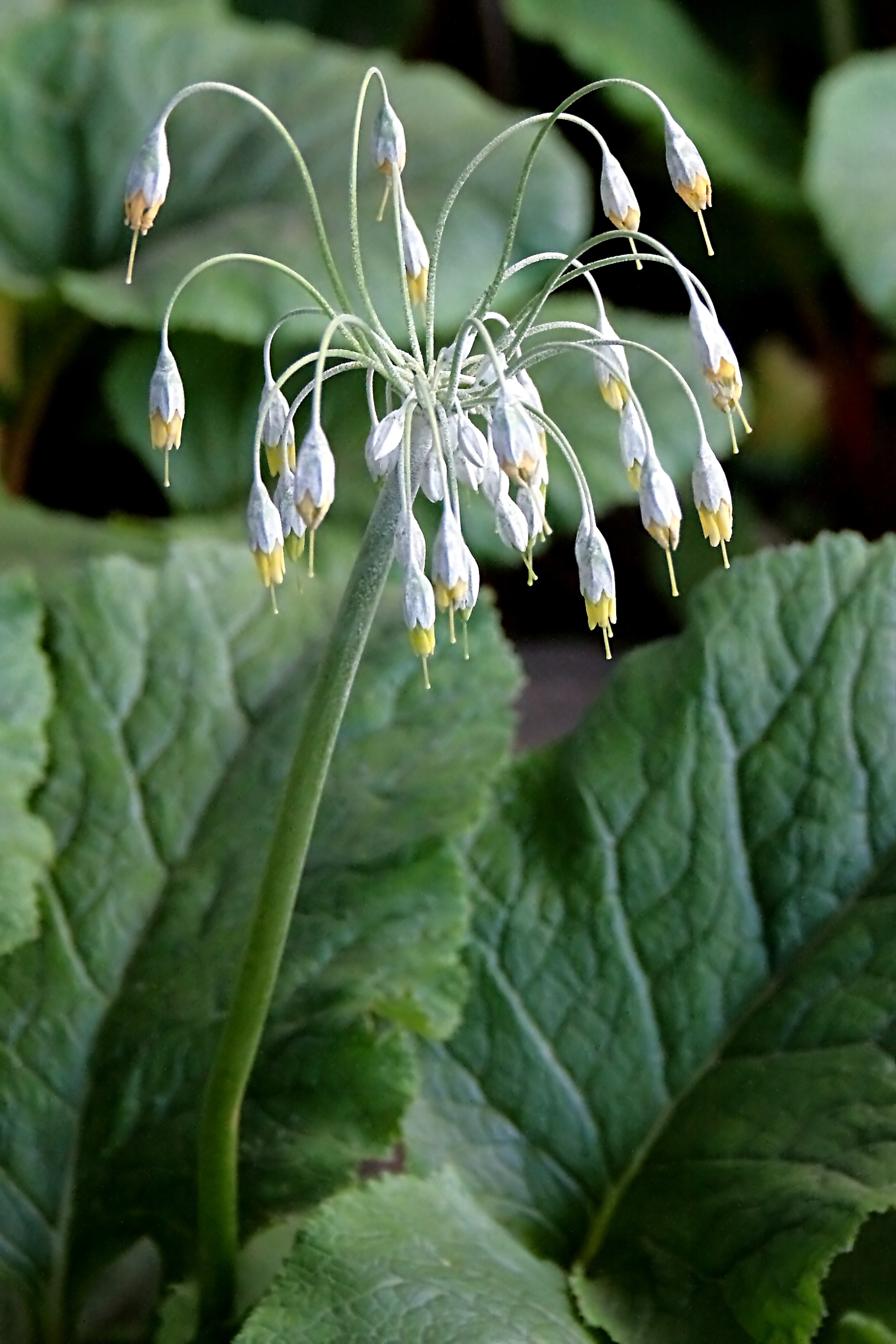 Ísland, Akureyri Botanical Gardens: Sredinskya grandis Primelgewächse (isländisch: Gýgjarlykill)